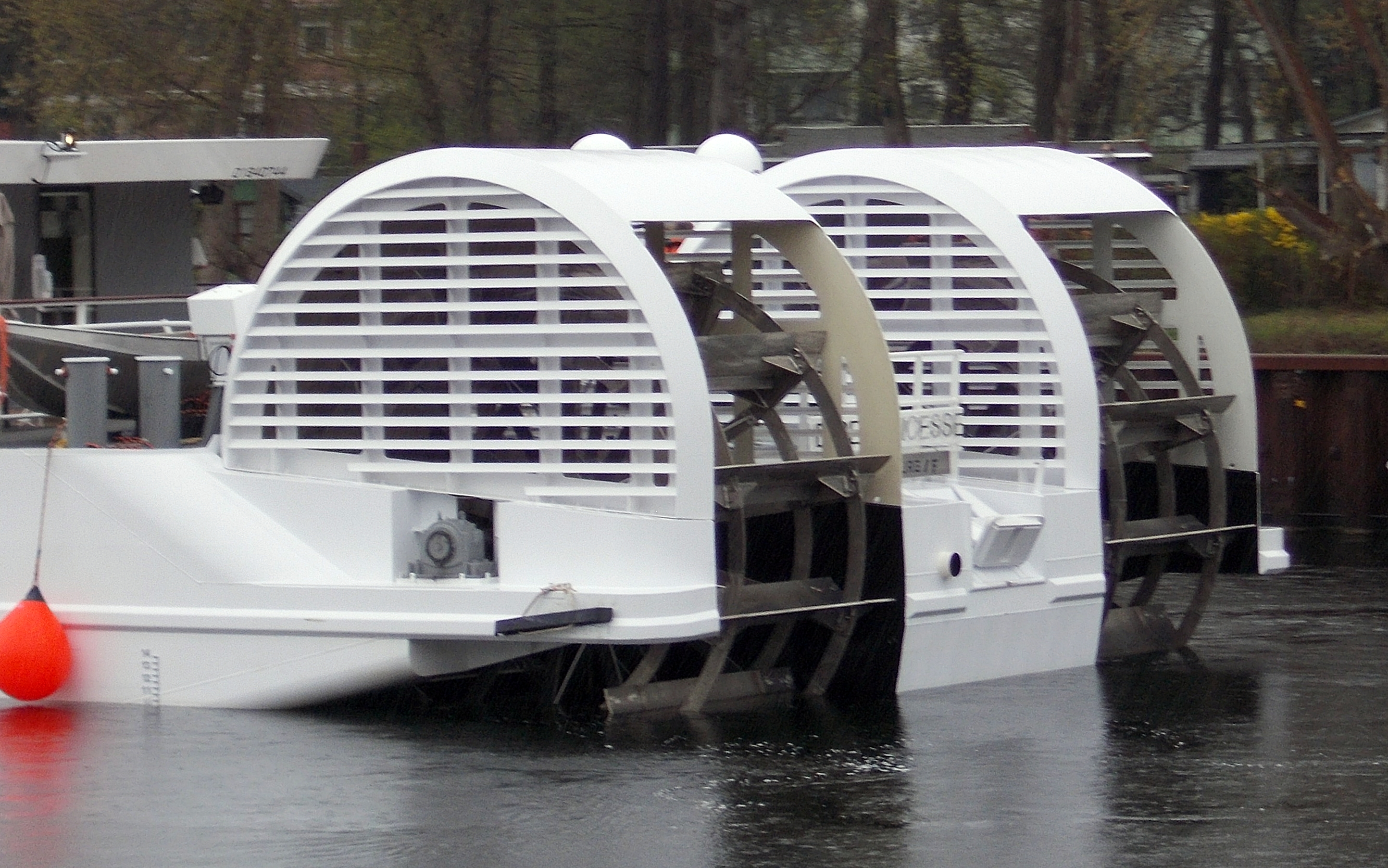 Kabinenfahrgastschiff Elbe Princesse in Potsdam auf dem Weißen See, Untere Havel-Wasserstraße.